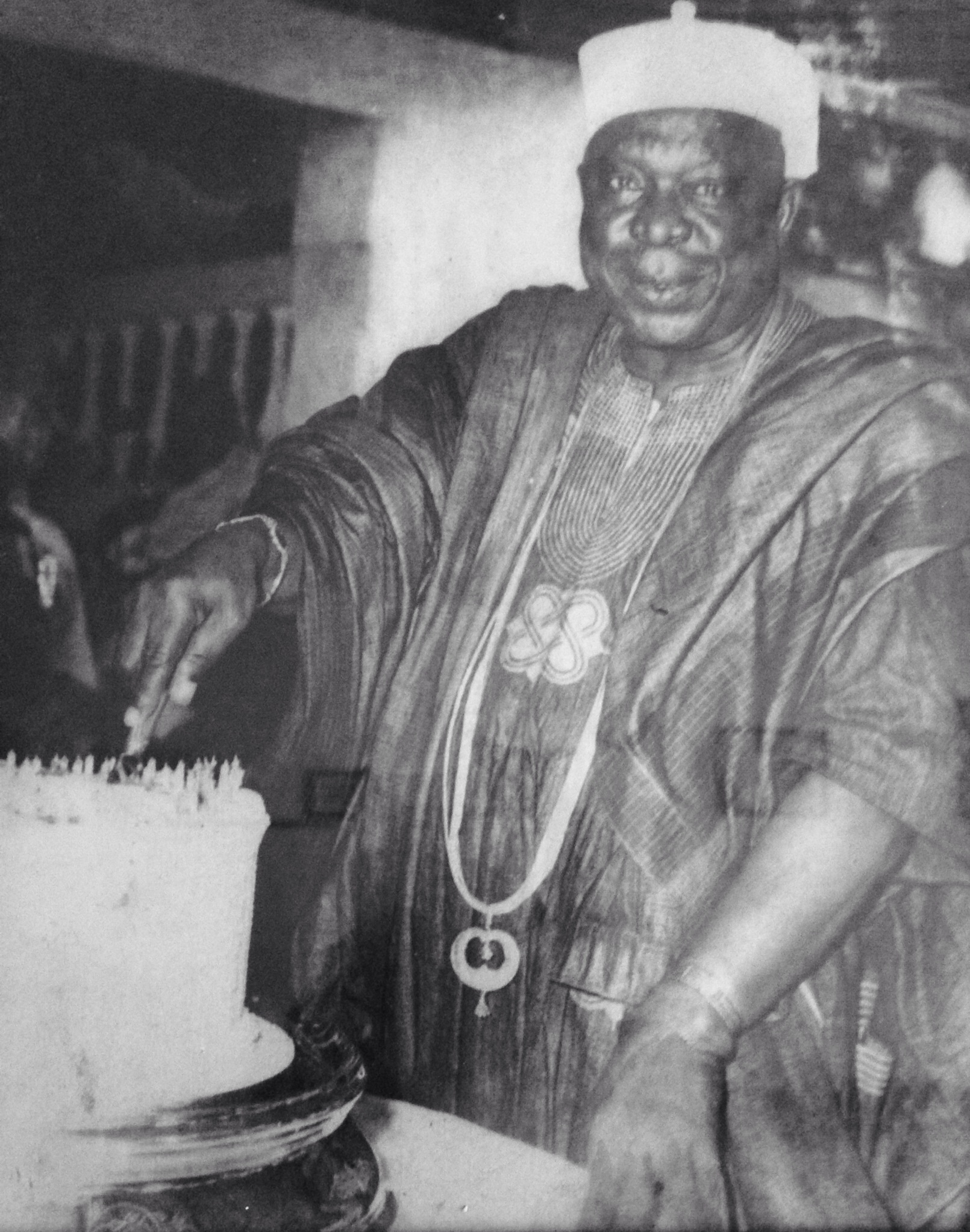 Akisanya celebrating his birthday